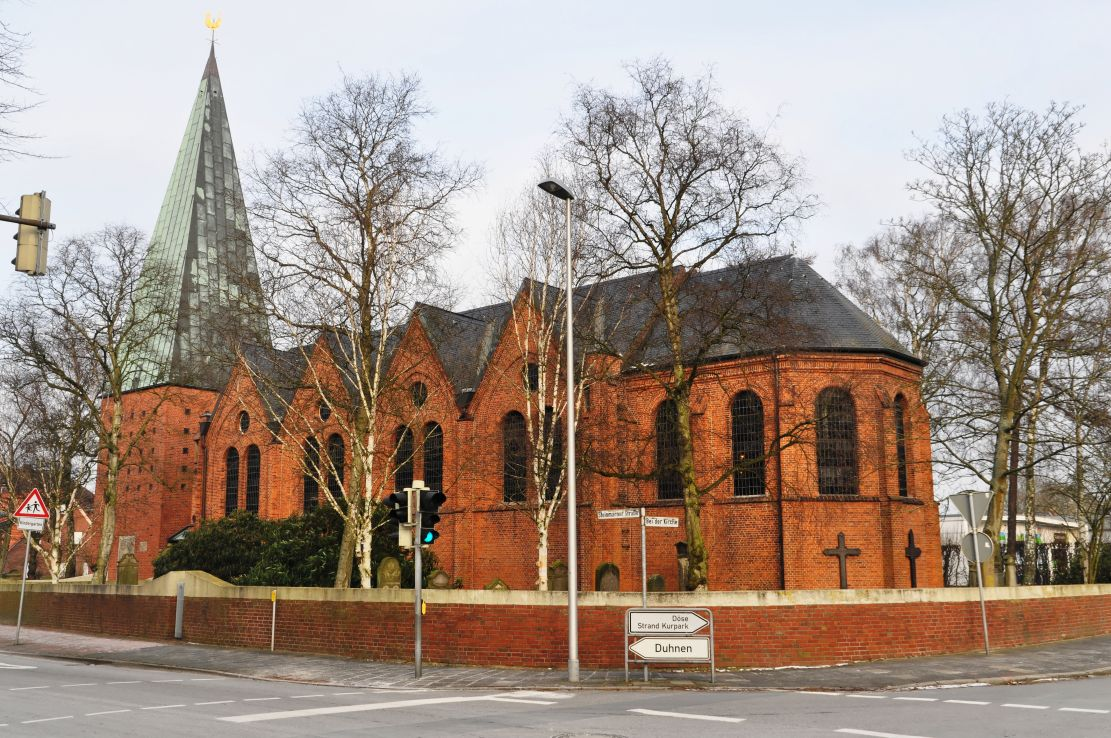 Cuxhaven 2014